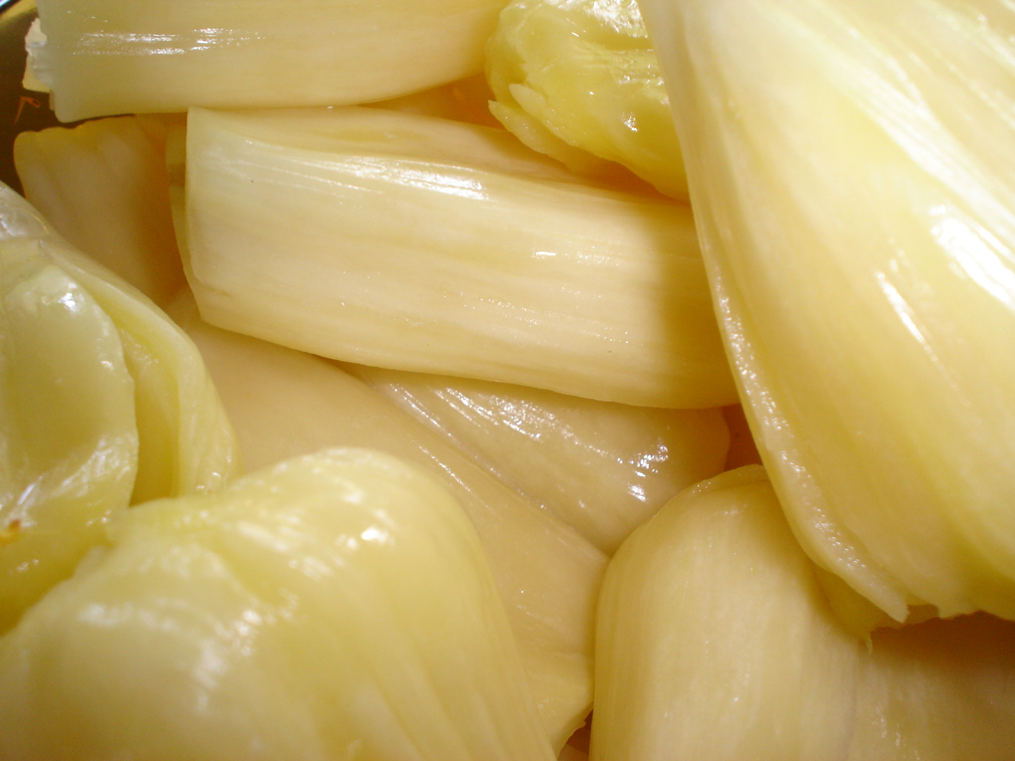 Jaca dura (Fruto)